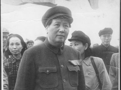 開國大典毛澤東與謝雪紅